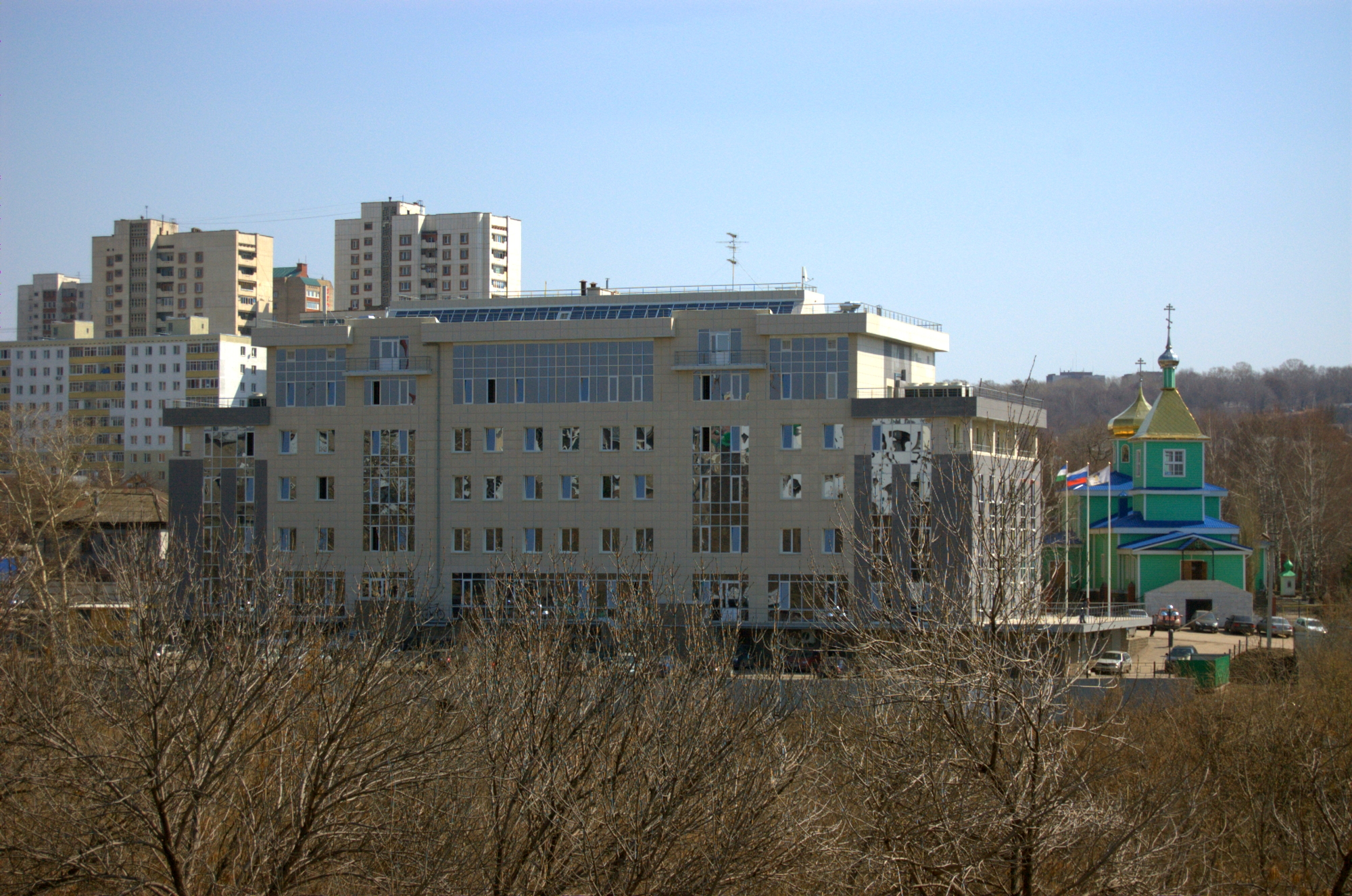 Офис УфаНИПИнефть.